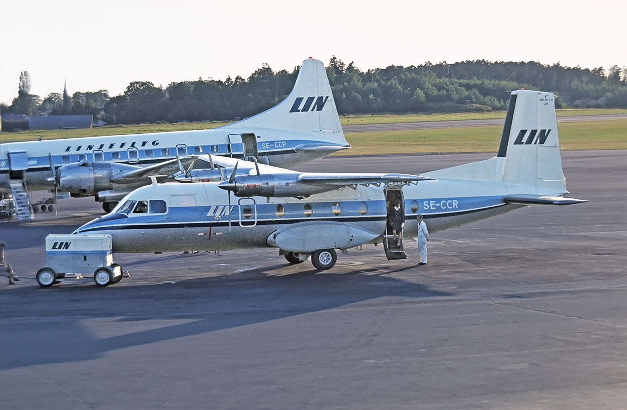 Linjeflyg Nord N-262A-26 SE-CCR at Stockholm-Bromma Airport